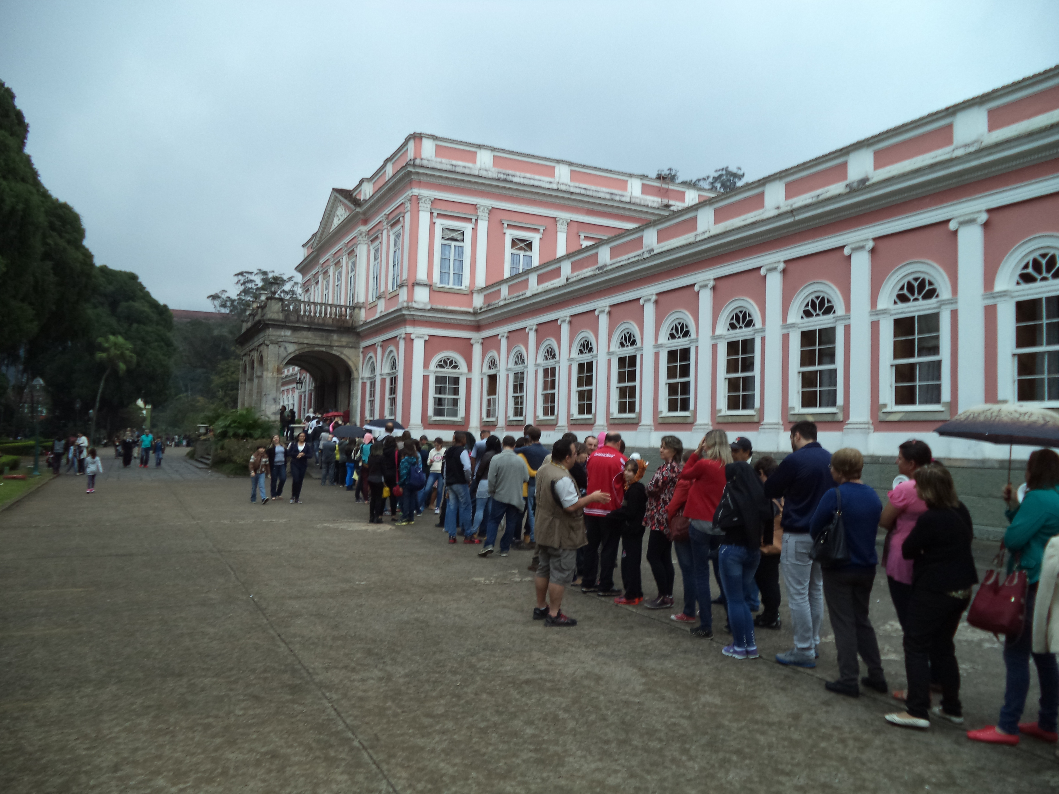 Fila na entrada do Museu Imperial, em Petrópolis.